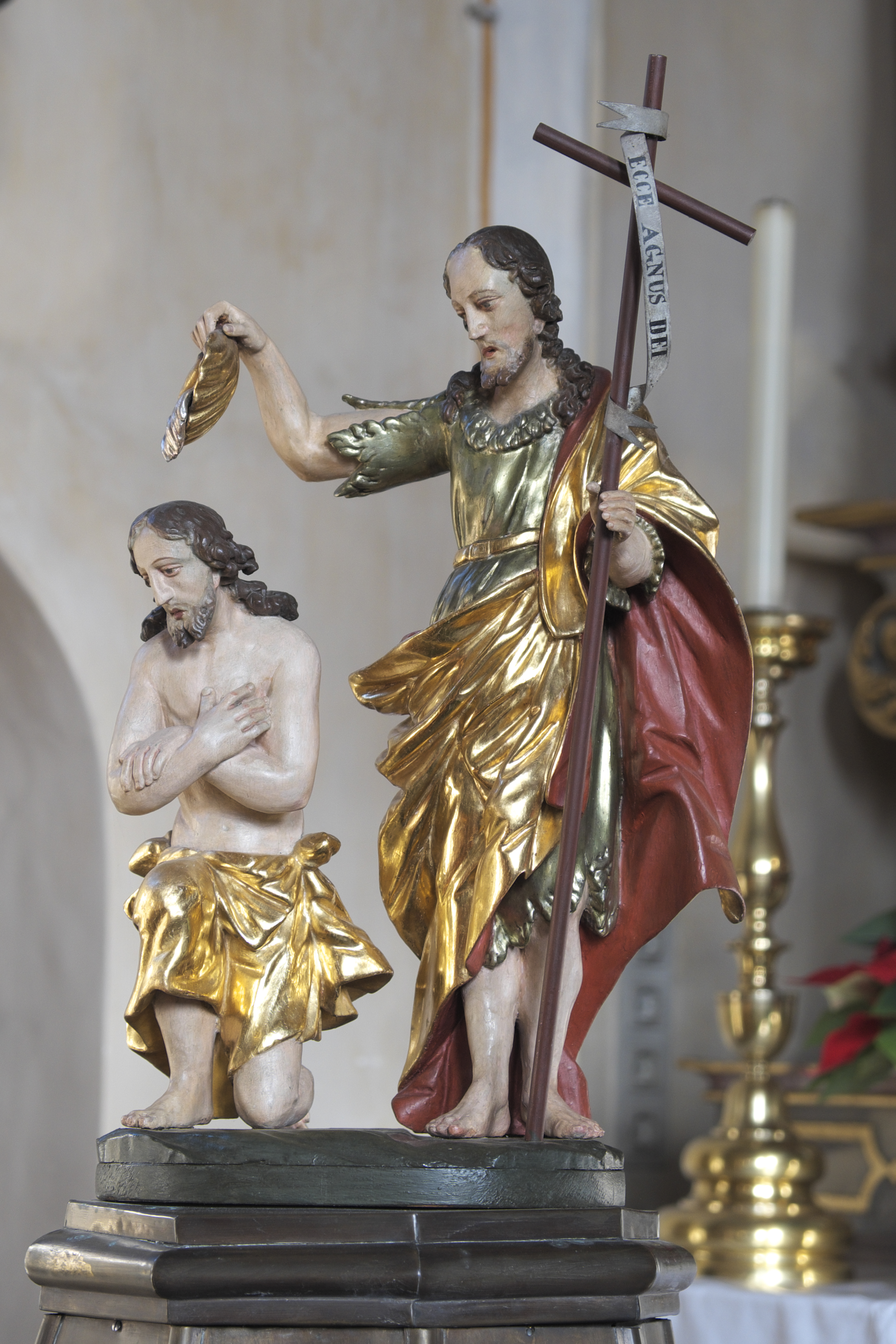 Katholische Pfarrkirche St. Laurentius in Petershausen im Landkreis Dachau (Bayern/Deutschland), Taufe Jesu